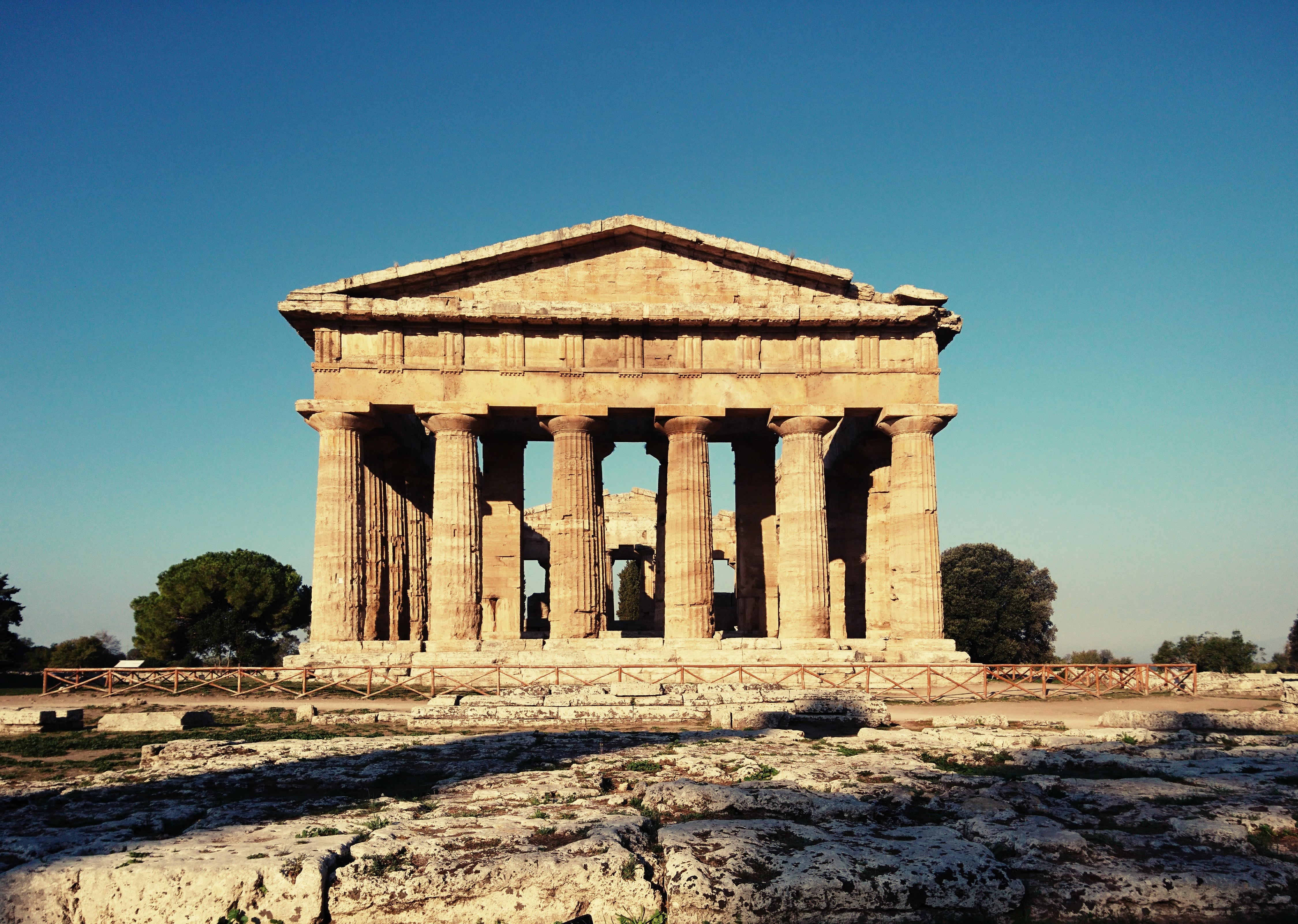 Fronte orientale del tempio di Nettuno.